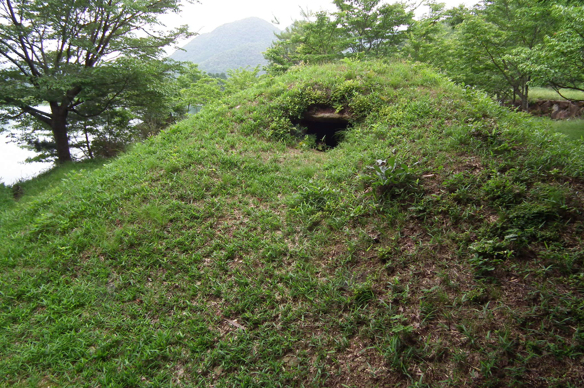 Fukutani-park 福谷公園・福谷池（兵庫県西脇市黒田庄町福谷）